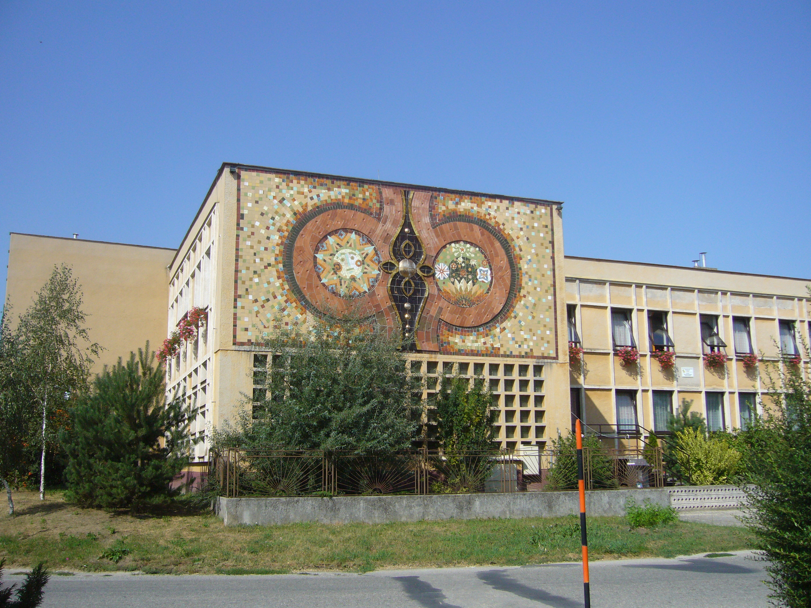 Búcs hivatal